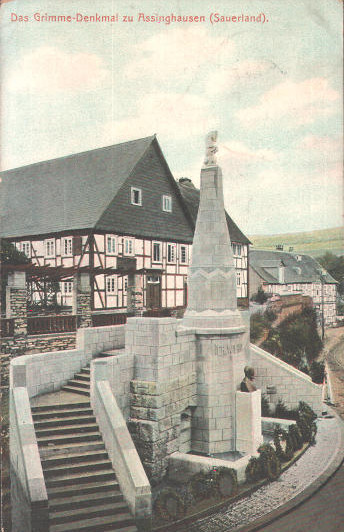 Grimme-Denkmal zu Assinghausen, at Olsberg, Germany, postcard around 1910